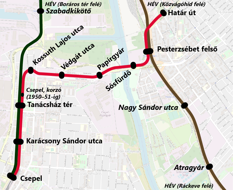 Az egykori Pesterzsébet-Csepel HÉV-vonal (H járat) útvonala This map may be incomplete, and may contain errors. Don't rely solely on it for navigation.